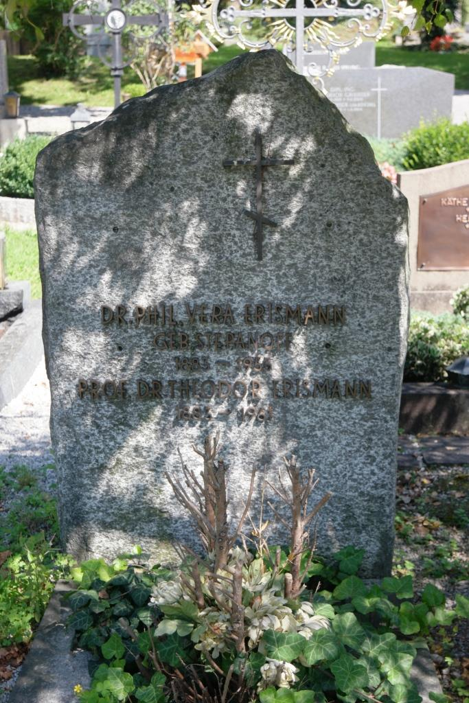 Grab des Psychologen Theodor Erismann (1883-1961) auf dem Neuen Friedhof Mühlau, Innsbruck